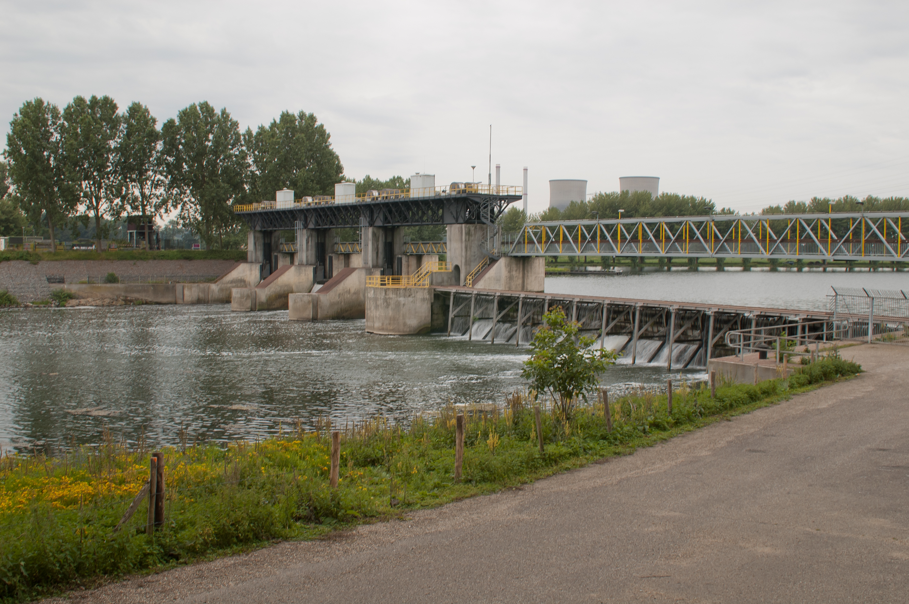 Staustufe in der Maas bei Linne, im Hintergrund hinter der Pappelreihe das Wasserkraftwerk, ganz hinten Kühltürme des Gaskraftwerks Clauscentrale in Maasbracht